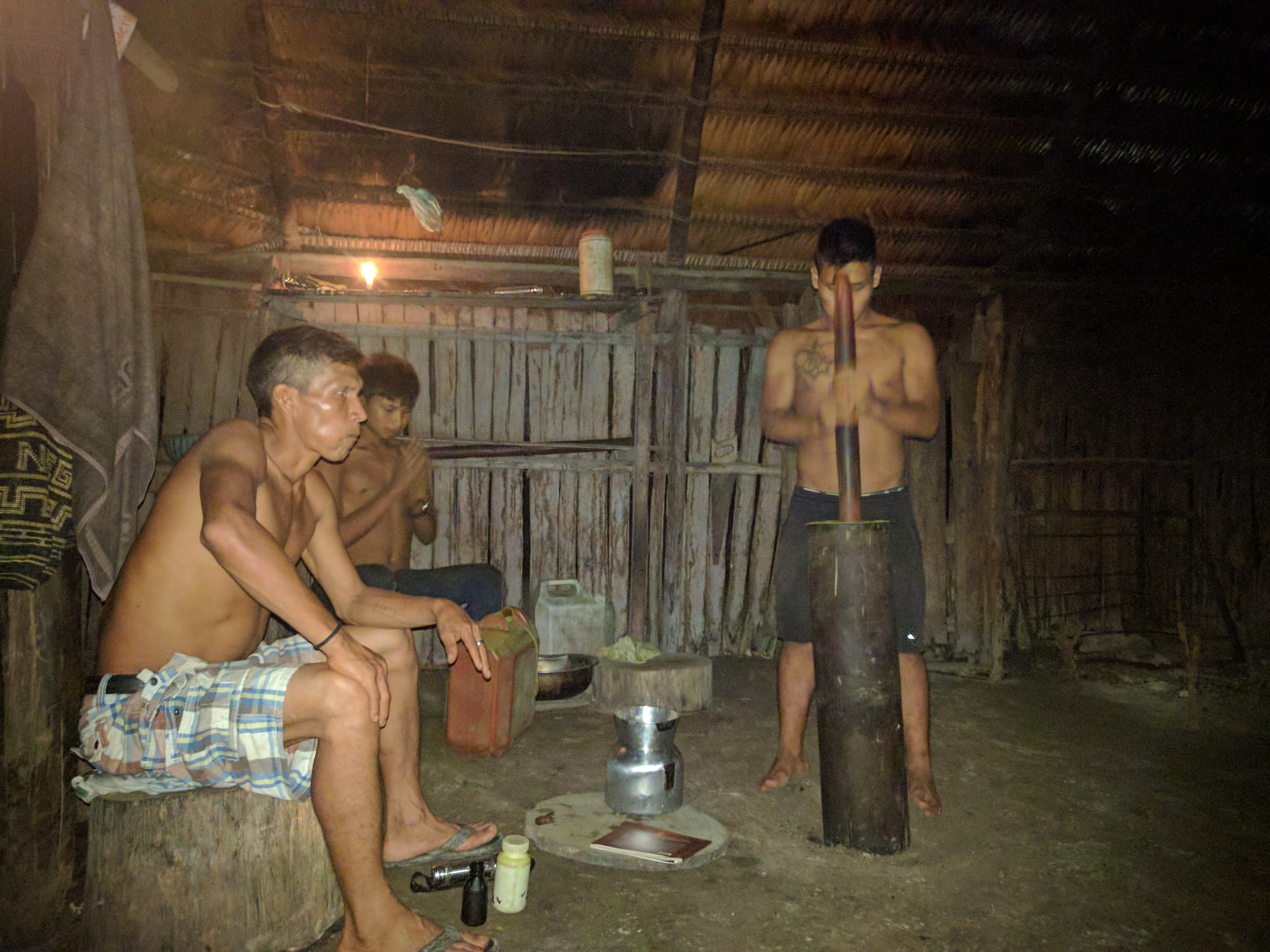 הכנת הממבה ולעיסתו במהלך טקס ה"ממבאה". צולם במאלוקה באיזור האמזונס בקולומביה, לא רחוק מלטיסיה.